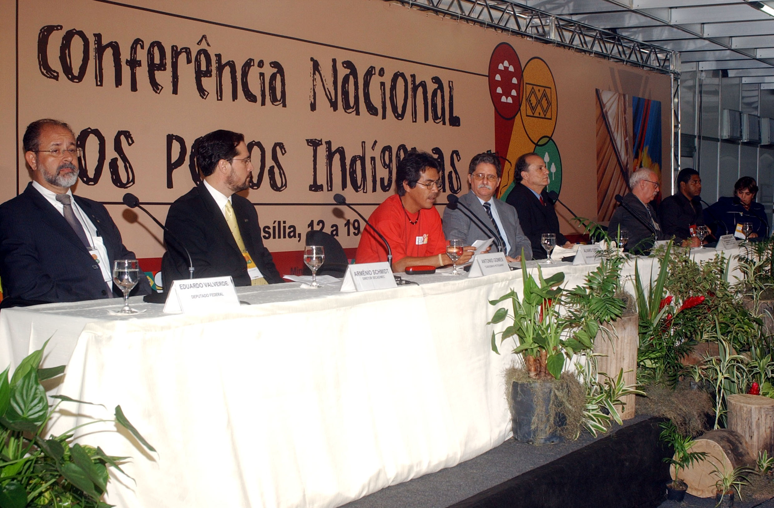 Brasília - E/d. deputado Eduardo Valverde, Armenio Schmidt, Antônio Gomes, Alvaro Costa, prsidente da FUNAI Mercio Gomes, Cláudio Scliar, Vilmar Guarany, Márcia Helena Lopes participam da abertura da Confêrencia Nacional Indígena.